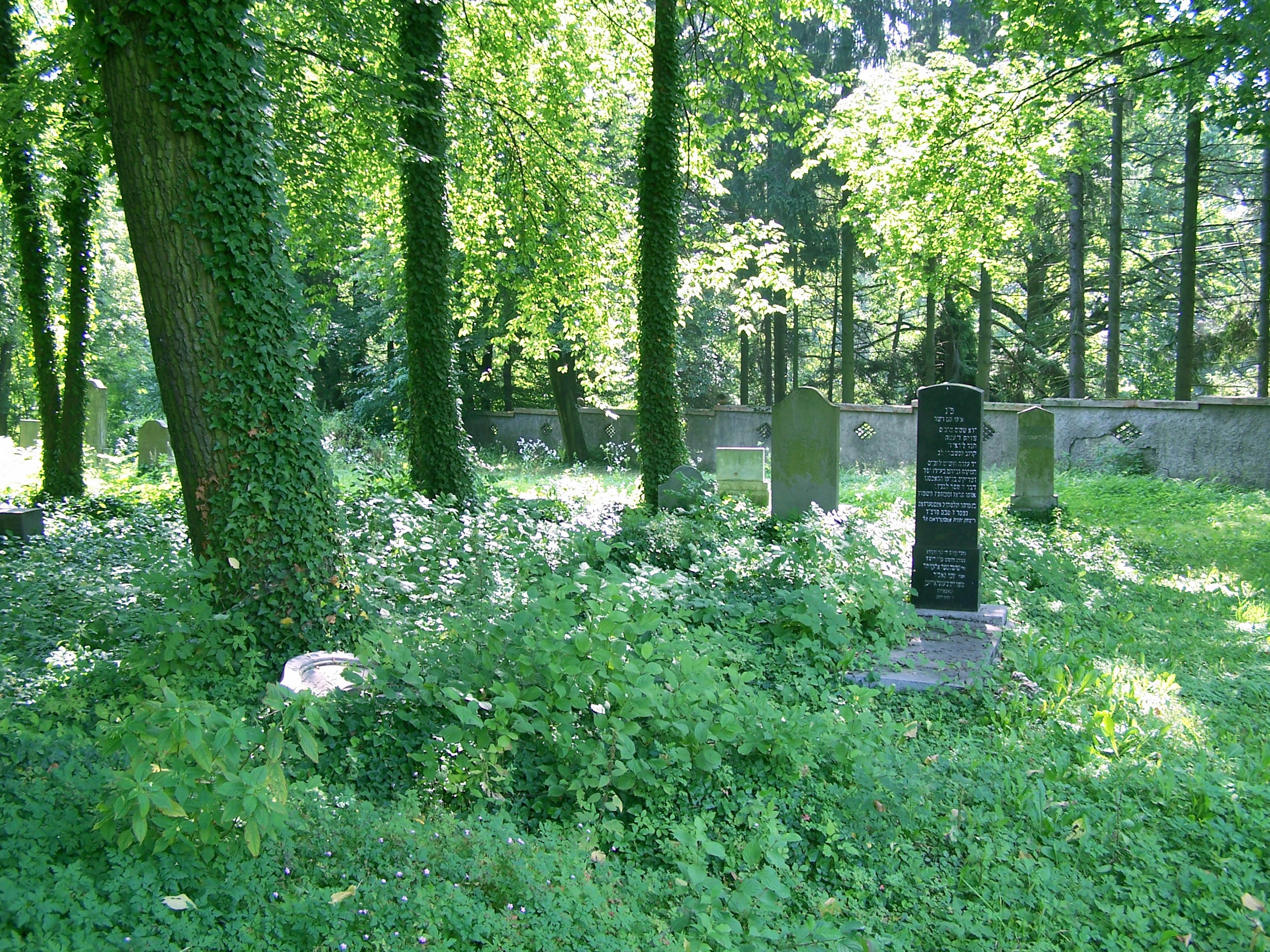 Abandoned Jewish cemetery in Český Těšín (Czeski Cieszyn)